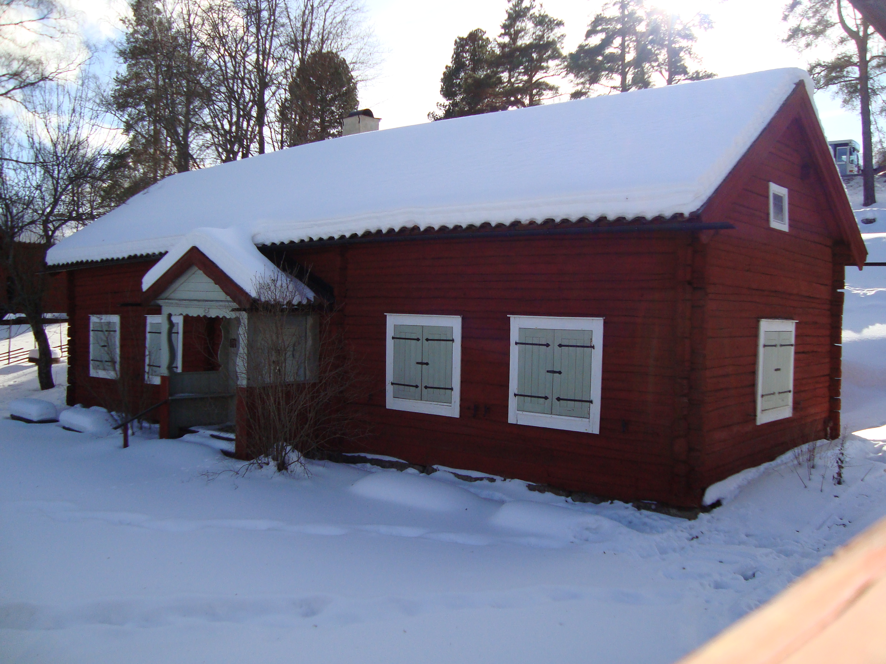 Storstugan, den först placerade byggnaden i Gammelgården, Hedemora, Sverige